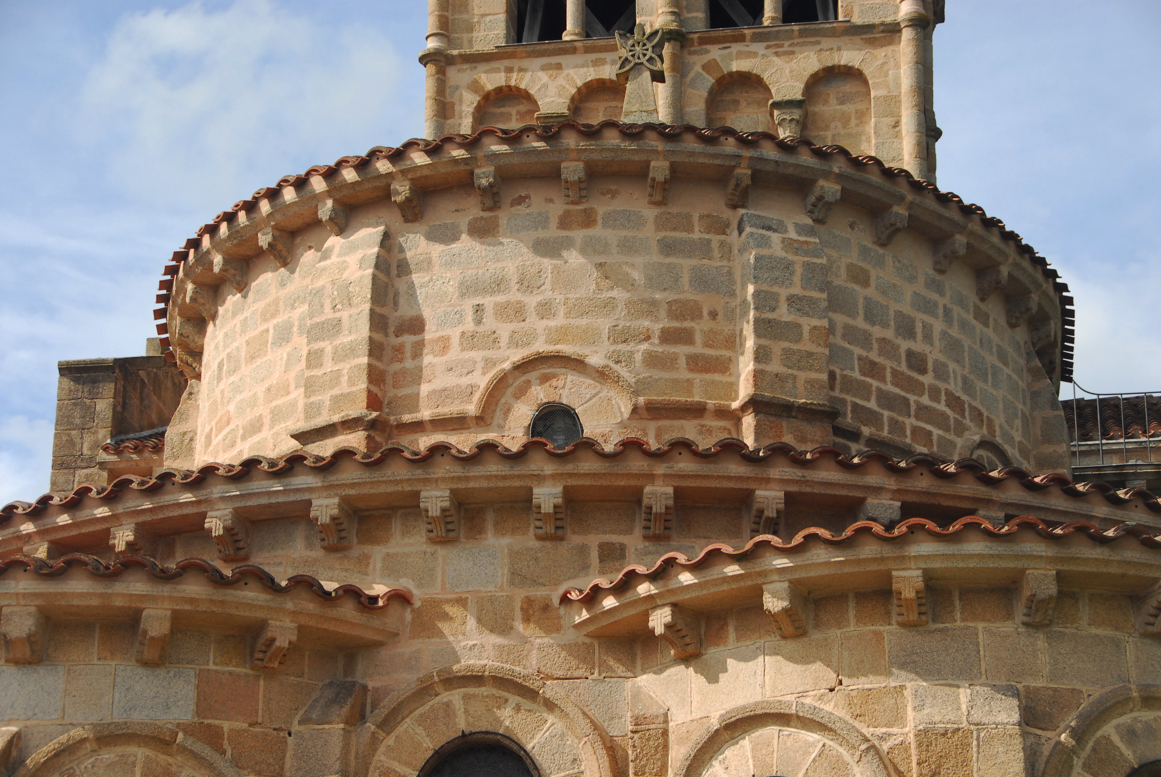 N.-D. de Châtel-Montagne, Detail Chorapsis von O